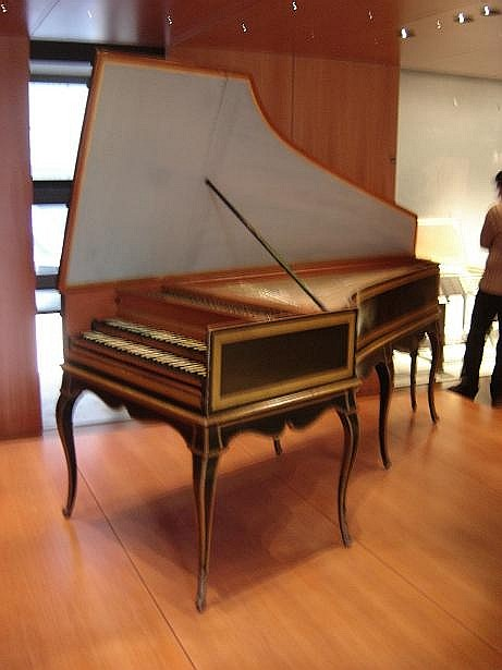 Clavecin fait par Hemsch - Paris 1761-1762 - Paris, Musée de la Musique